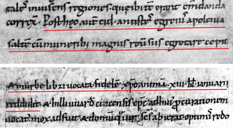 Satz mit der Ersterwähnung Leipzigs in der Dresdner Handschrift der Chronik des Thietmar von Merseburg, (Bildmitte Seitenwechsel in der Chronik S. 152a/b) Lateinischer Text (R. Holtzmann, MGH SS rer. Germ. N. S. 9, Berlin 1935, S. 428): Post haec autem Eid antistes egreius a Polenia saltem cum muneribus magnis reversus egrotare cepit et in urbe Libzi vocata fidelem Christo animam XIII. Kal. Ianuarii reddidit. Deutsche Übersetzung (J. C. M. Laurent, Die Chronik Thietmar's, Berlin 1848, S. 277): Darnach begann der treffliche Bischof Eid (von Meißen), nachdem er eben mit großen Geschenken aus Polen zurückgekehrt war, zu kränkeln und gab am 20. Decbr. in der Stadt Libzi [Leipzig] Christo die gläubige Seele zurück.